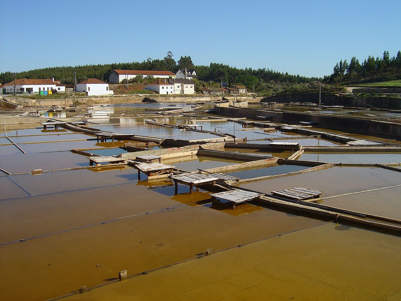 A ausência de sal nesta fotografia deve-se ao facto de ter estado a chover durante os vários dias anteriores...